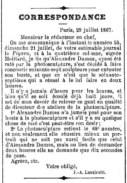 Correspondance à propos du buste d'Alexandre Dumas et de la photosculpture. Le nom de l'auteur a été déformé. Il s'agit d'Antonio Giovanni Lanzirotti.